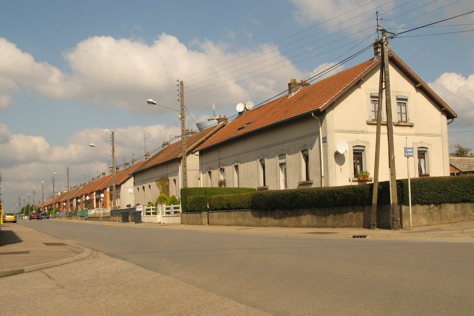 Maisons a Mont-Bonvilliers au croisement de la Rue Nationale et du Chemin des Fronts